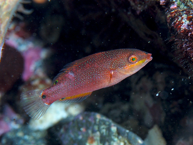 アカオビベラ Stethojulis bandanensis